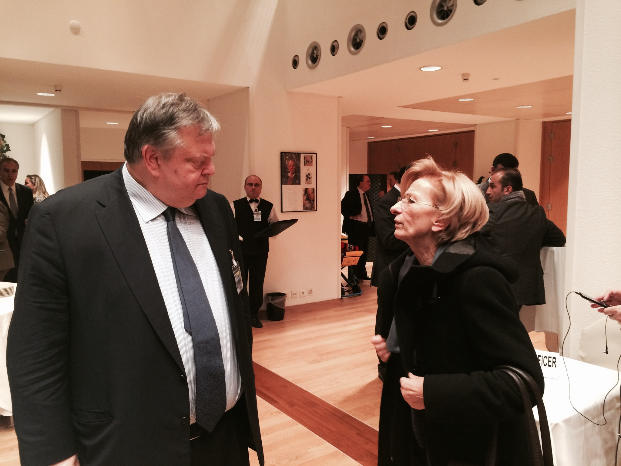 Συνάντηση Αντιπροέδρου της Κυβέρνησης και ΥΠΕΞ Ευ. Βενιζέλου με την Υπουργό Εξωτερικών της Ιταλίας Emma Bonino στη Διάσκεψη ‘‘Γενεύη II’’ για τη Συρία (22.01.2014)